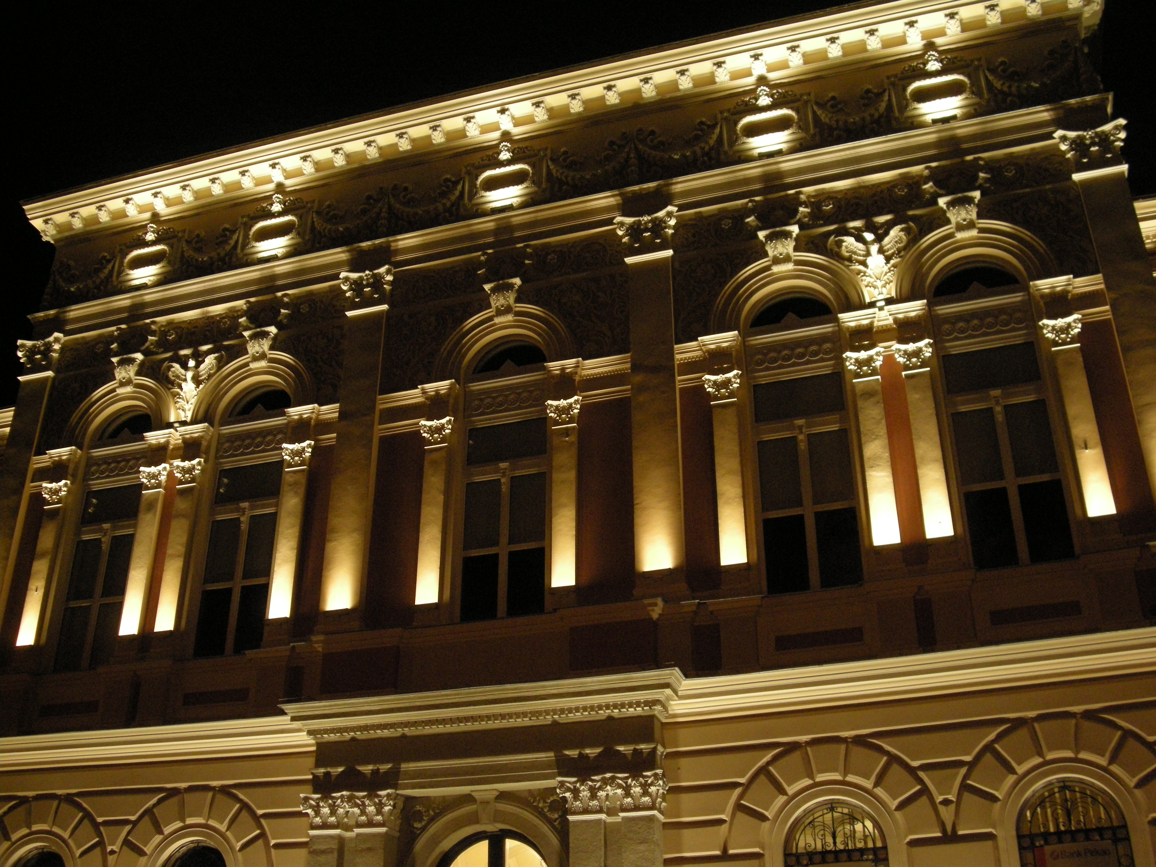 Fasada budynku dawnego Miejskiej Kasy Oszczędności z Salą Lustrzaną na piętrze